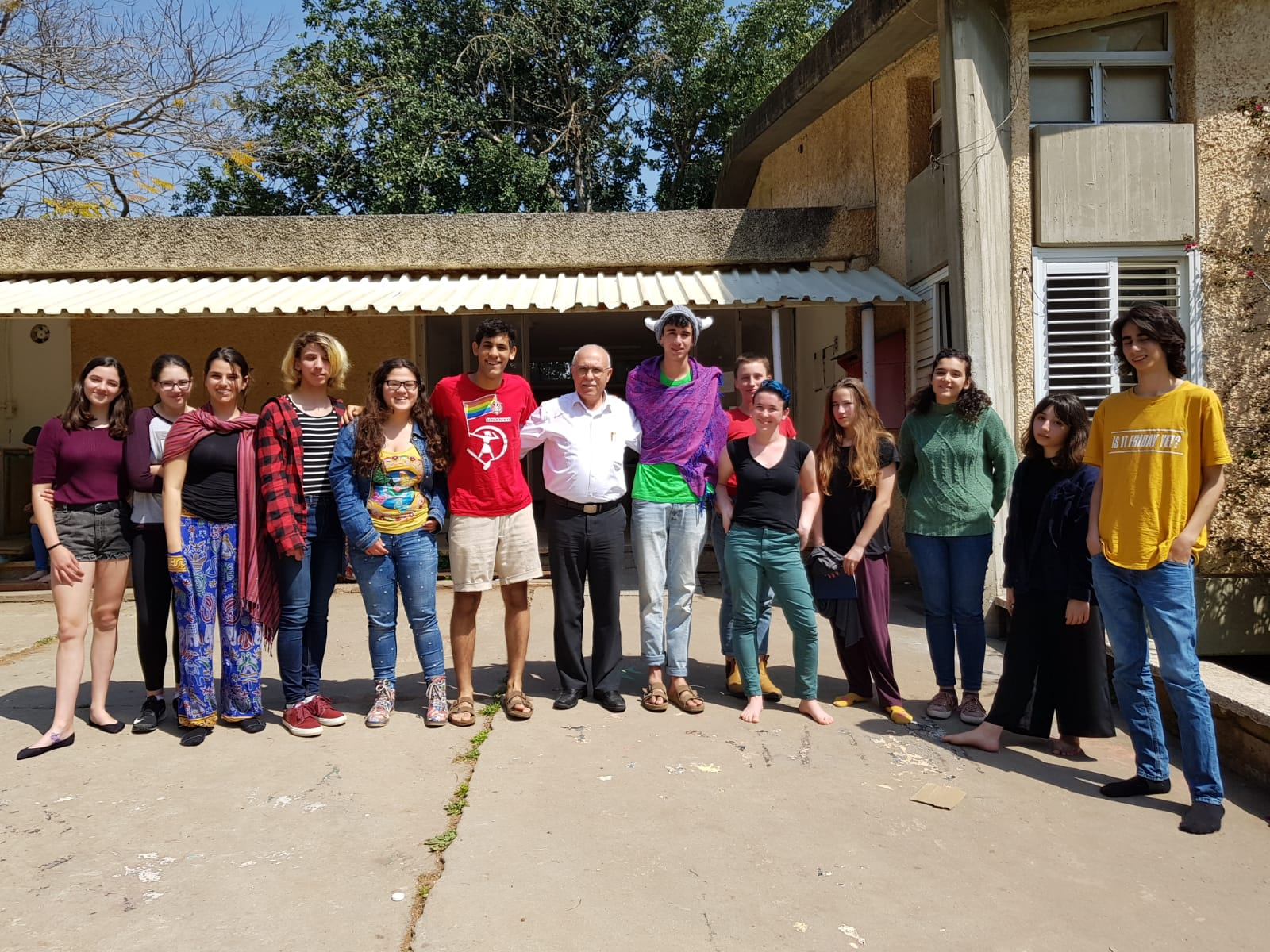 פגישה של עלי סלאלחה עם נוער מרצ בסמינר בחירות 2019